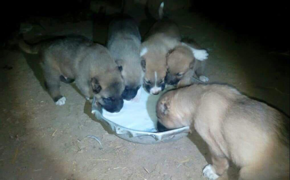 Qurdbasar